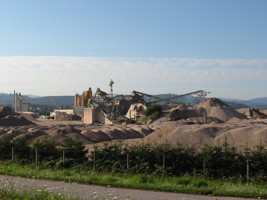 Les ballastières Cantrelle Commune de Sainte-Marguerite dans les Vosges (France) Copyright © Christian Amet